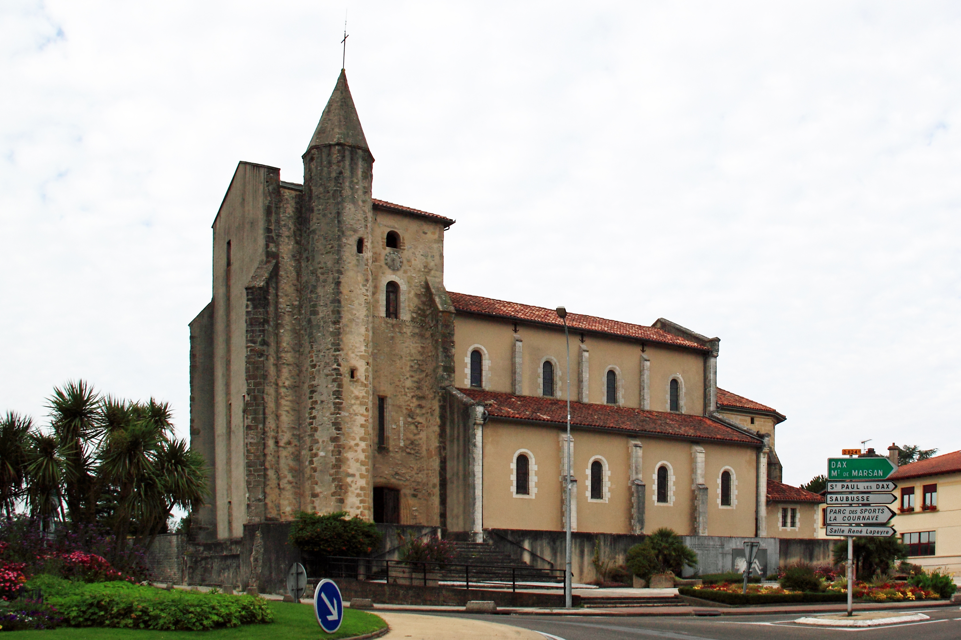 Église Saint-Georges de Saint-Geours-de-Maremne, (Inscrit, 1969) .